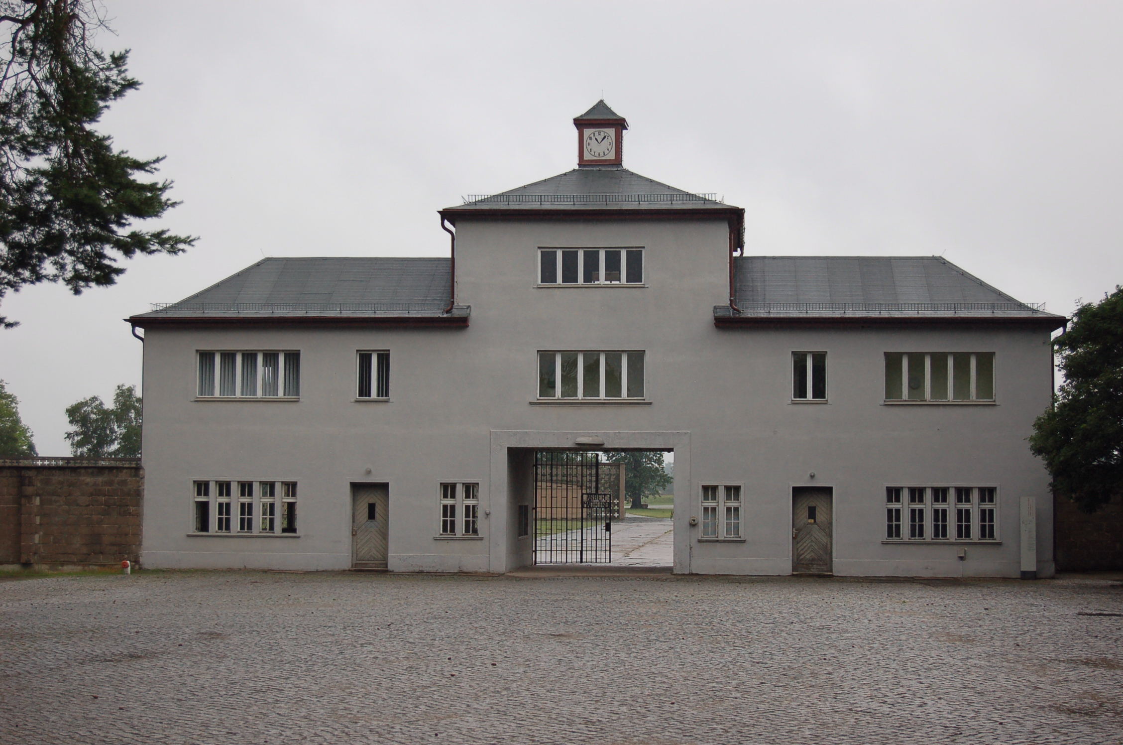 Turm A des Konzentrationslagers Sachsenhausen (Brandenburg)